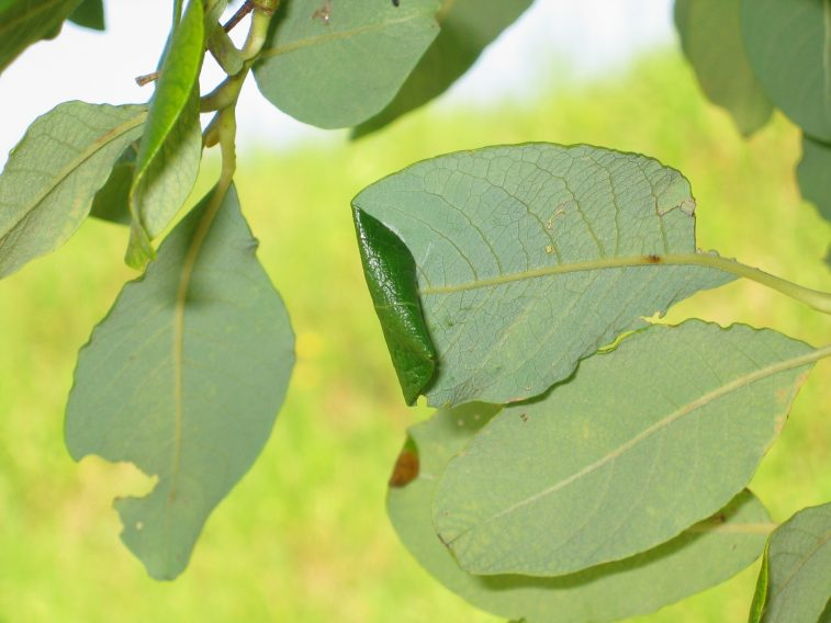 Blattrolle von Caloptilia stigmatella